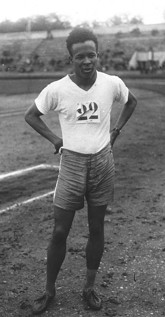 Stade Pershing : Théard : portrait en pied : [photographie de presse] / Agence Meurisse